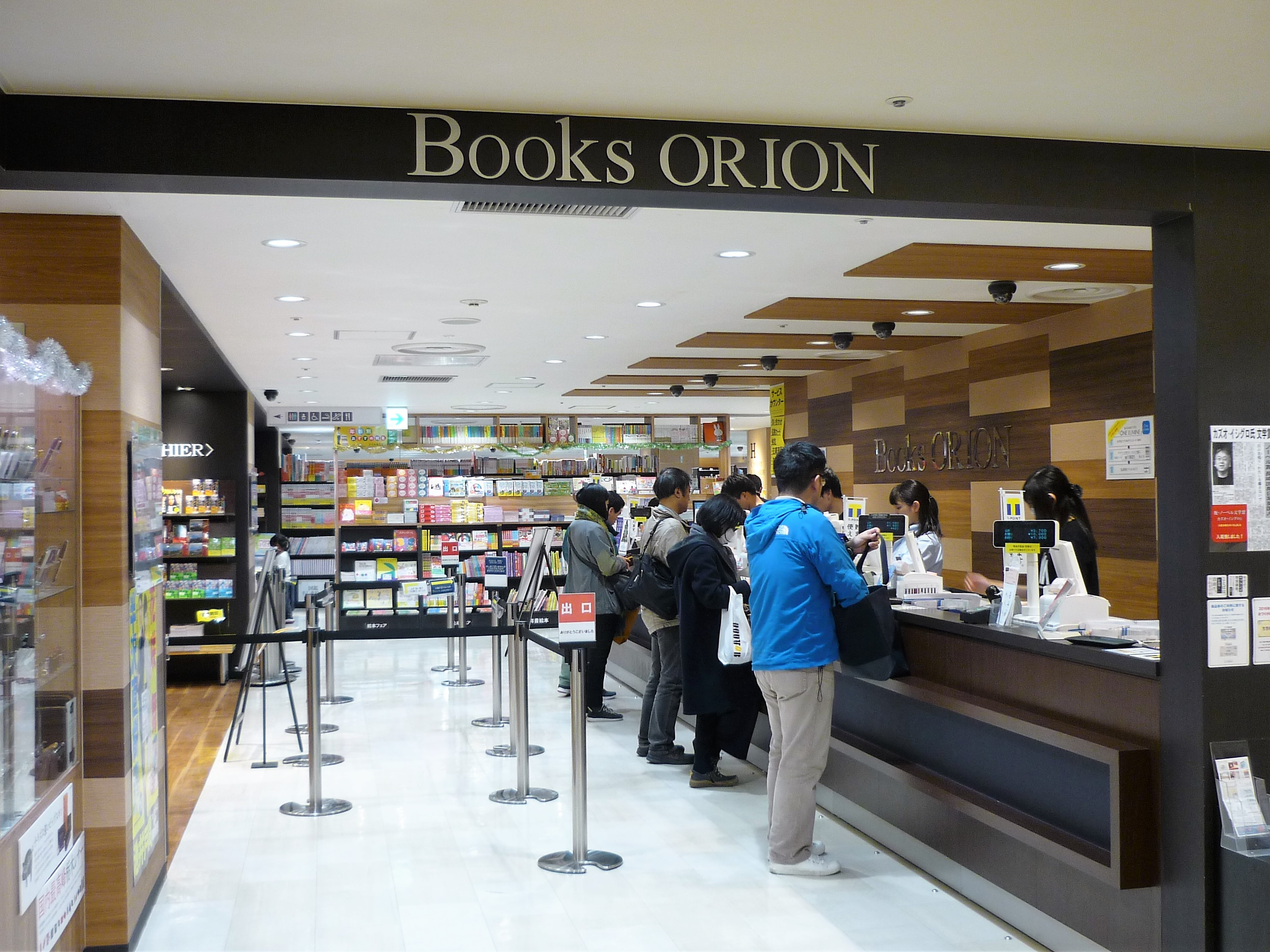 オリオン書房ルミネ店（立川駅北口）